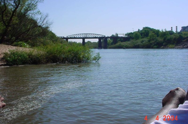 Borges de Medeiros bridge, im Alegrete.